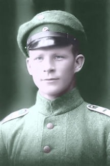 Description